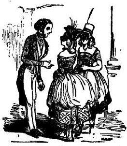 Scène de carnaval, illustrant "Les mystères de la vie du monde, du demi-monde et du quart de monde, ou La vie d'aujourd'hui..." / par Louis-François L'Héritier... Huillery éditeur, Paris 1869.